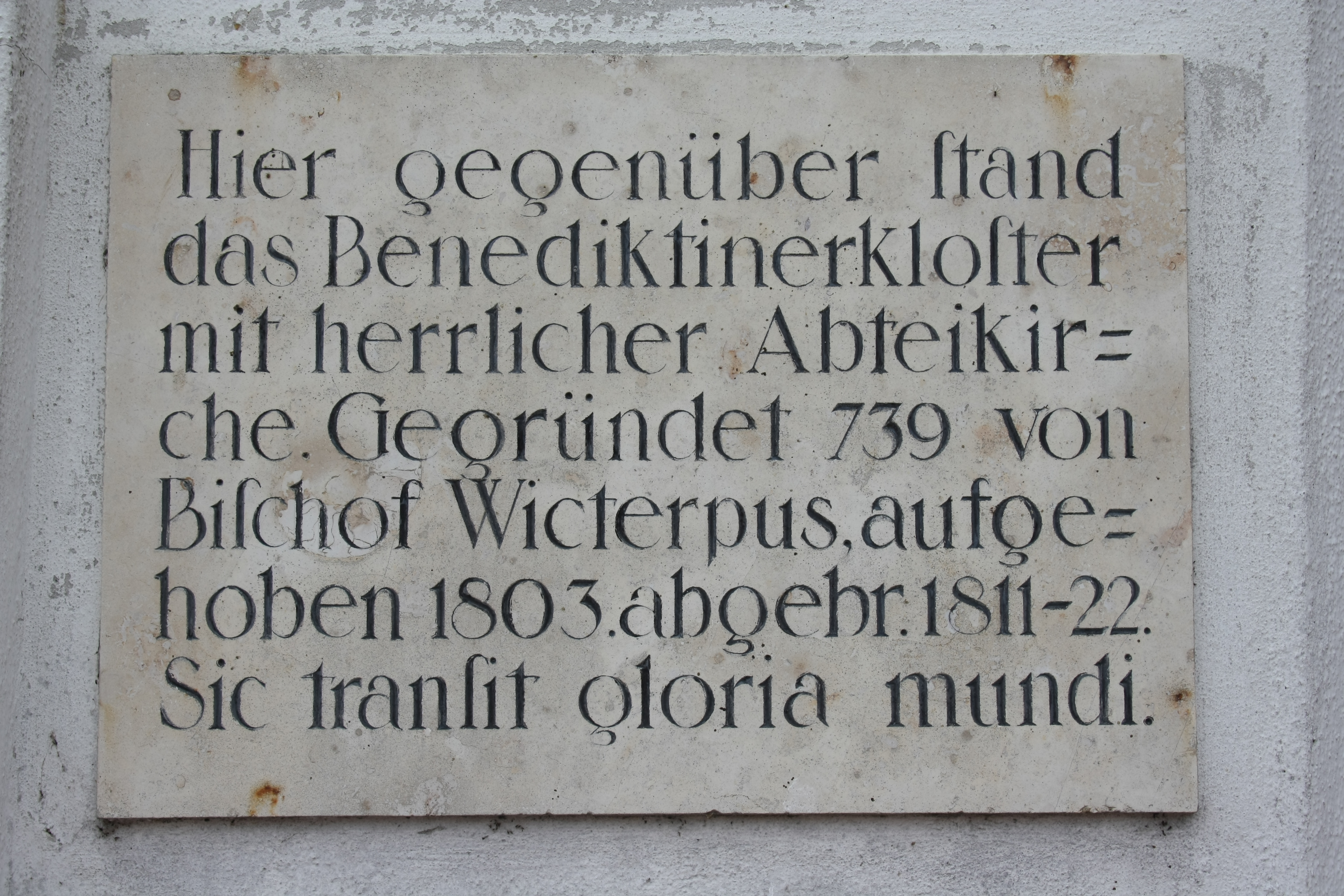 Wegkapelle St. Michael in Fultenbach, Ortsteil von Holzheim (bei Dillingen an der Donau)